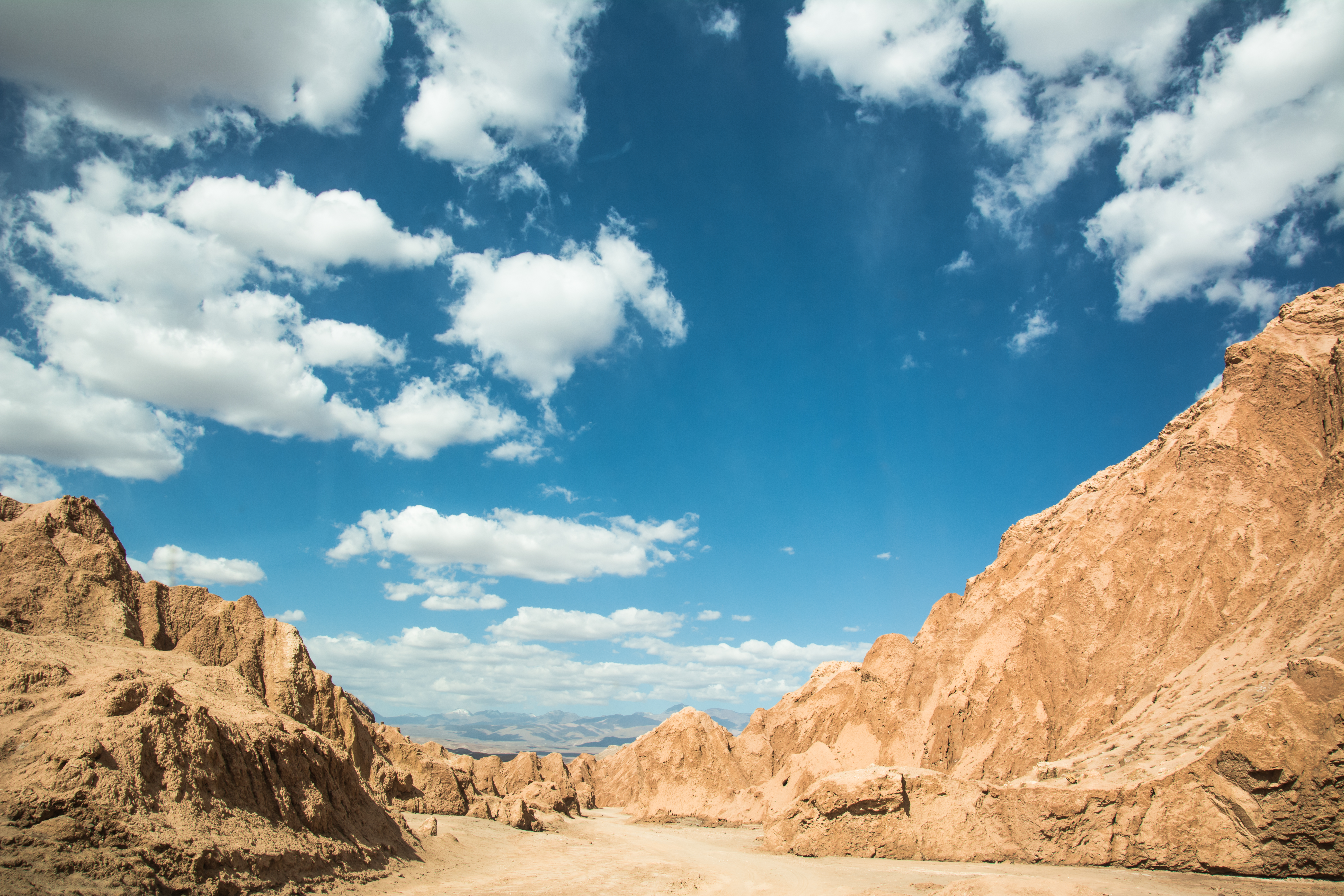 En la Cordillera de la Sal, camino al Valle de la Muerte